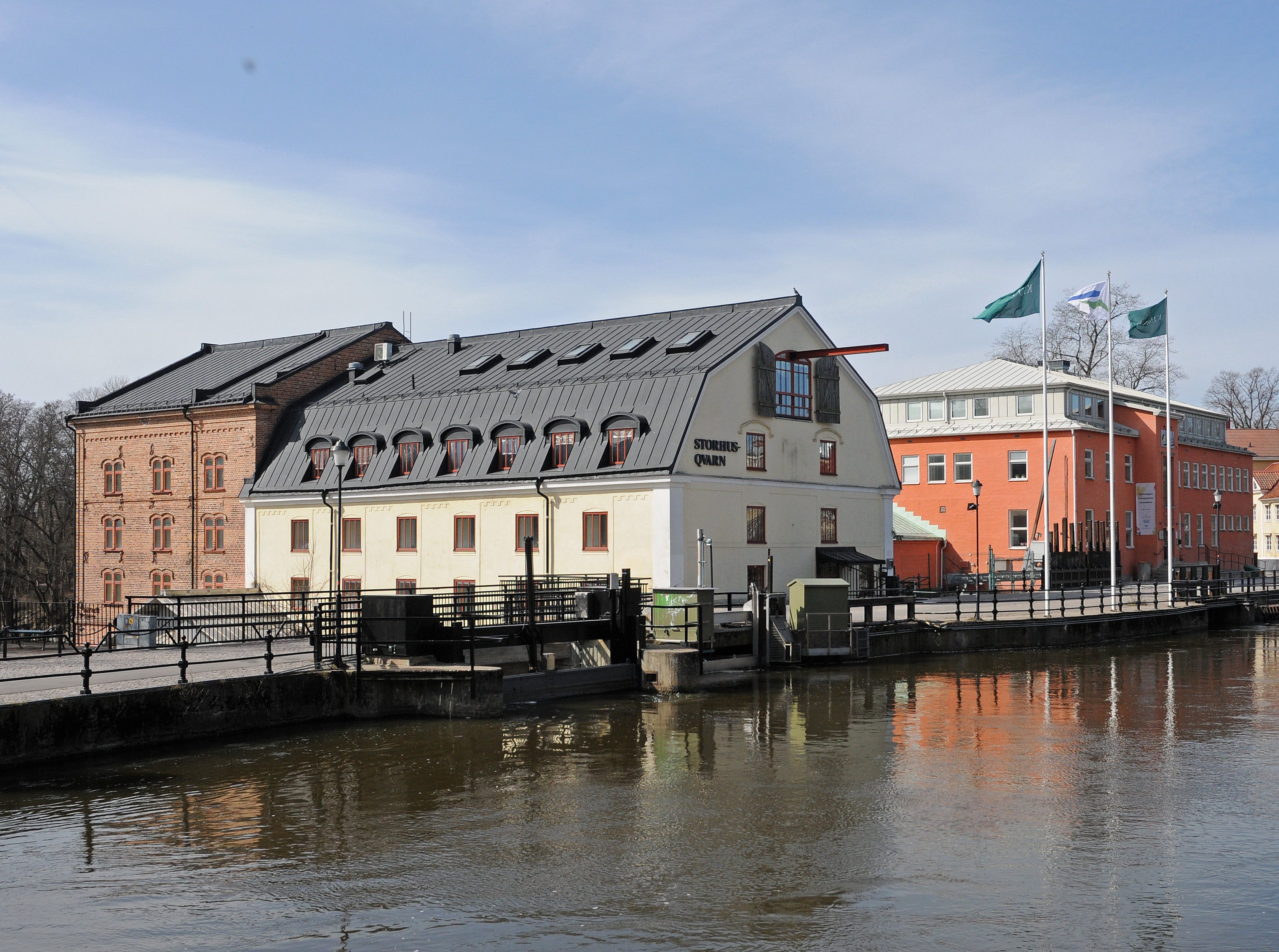 Storhus Qvarn i Nyköping